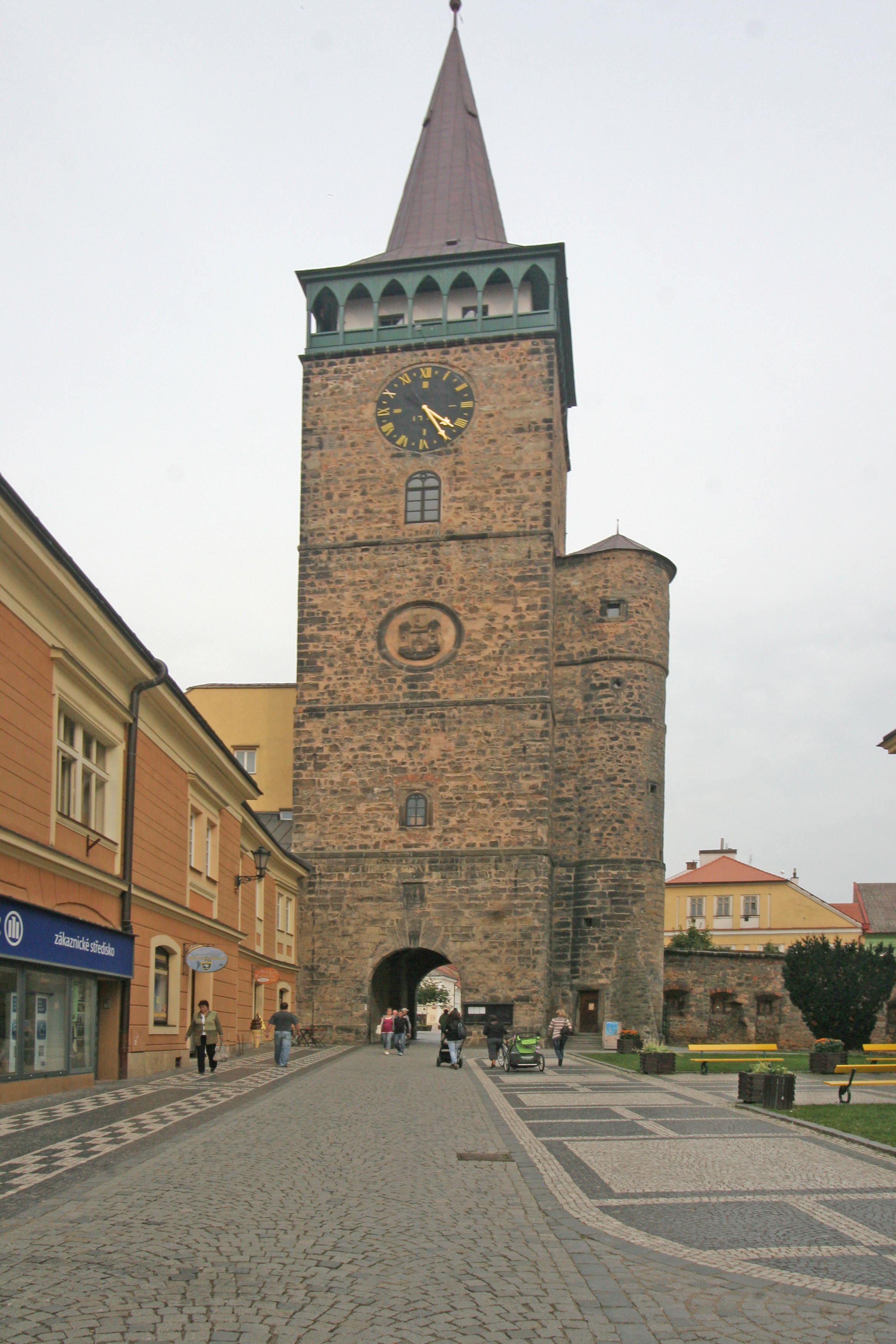 městské opevnění s Valdickou bránou